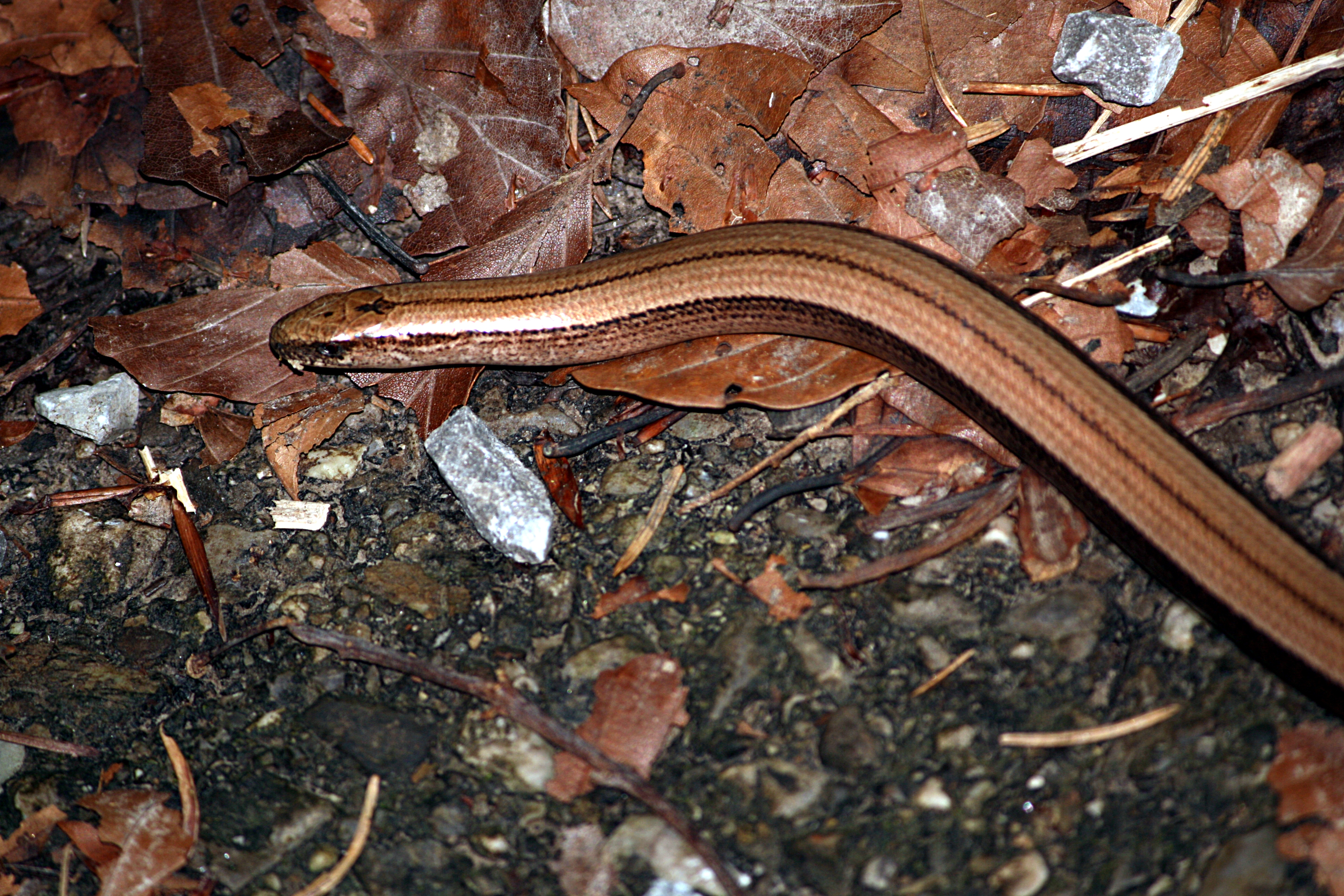 Anguis fragilis, Blindschleiche